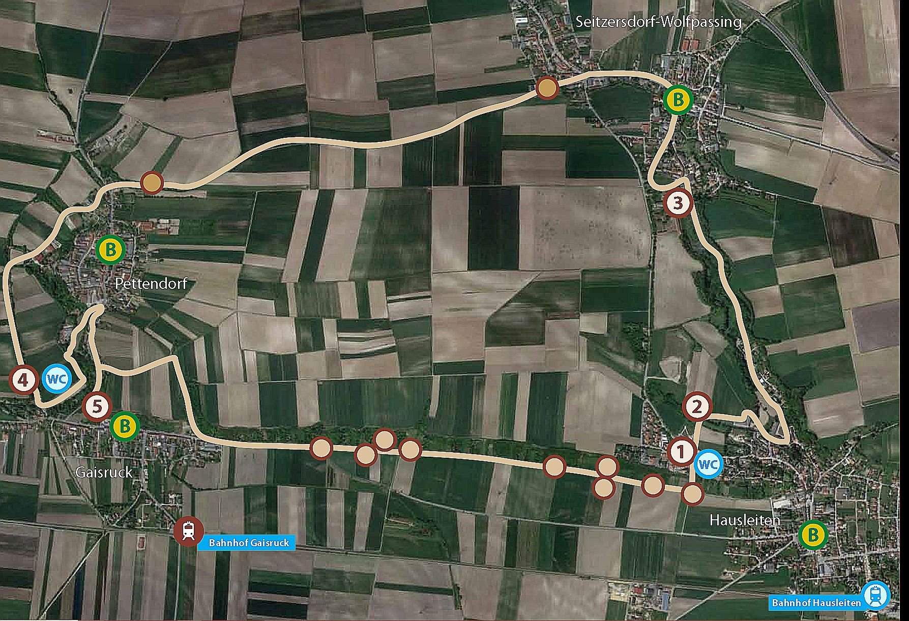 Zeigt den gesamten Verlauf des Weges